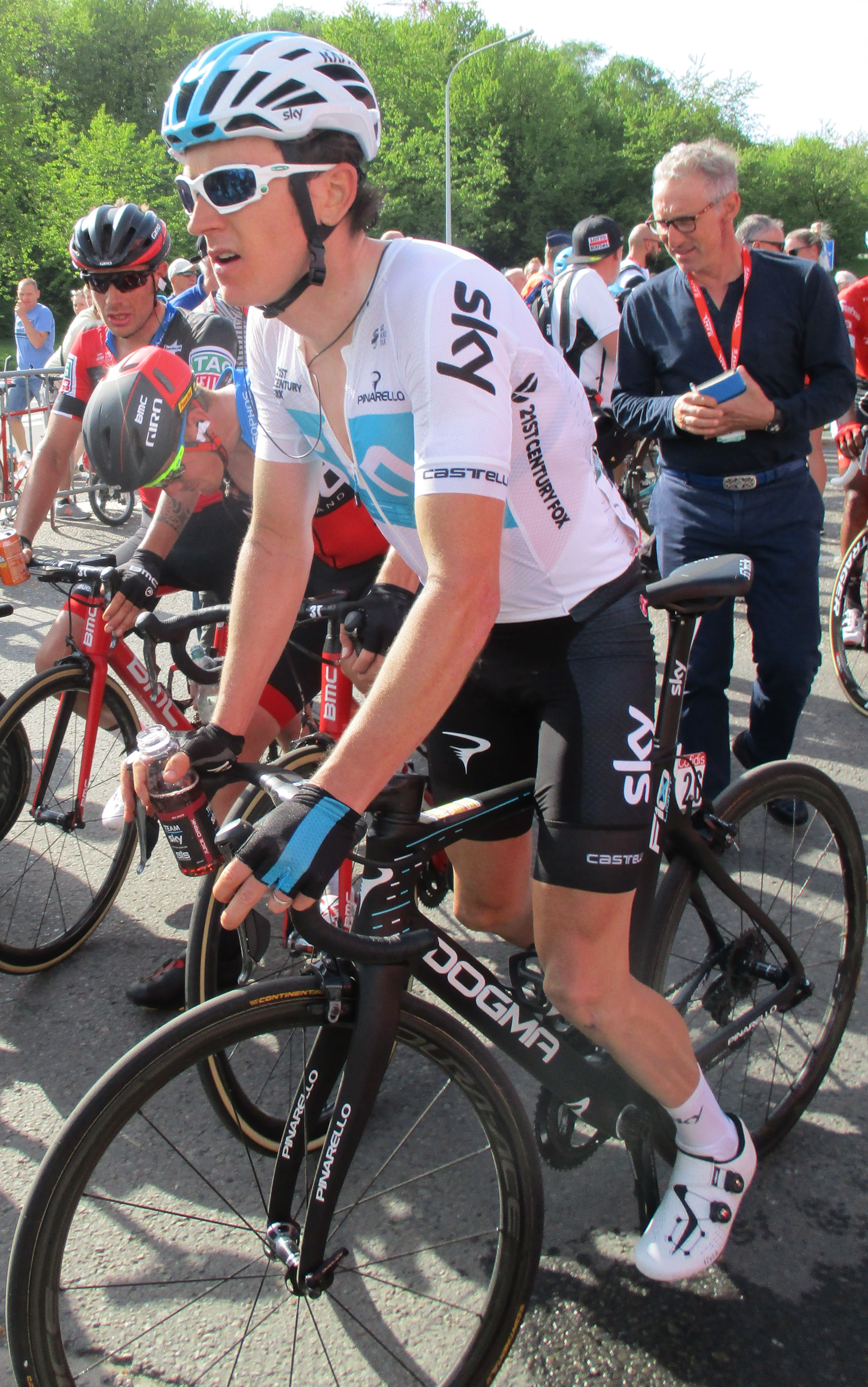 Finish van Luik-Bastenaken-Luik 2018 in Ans.